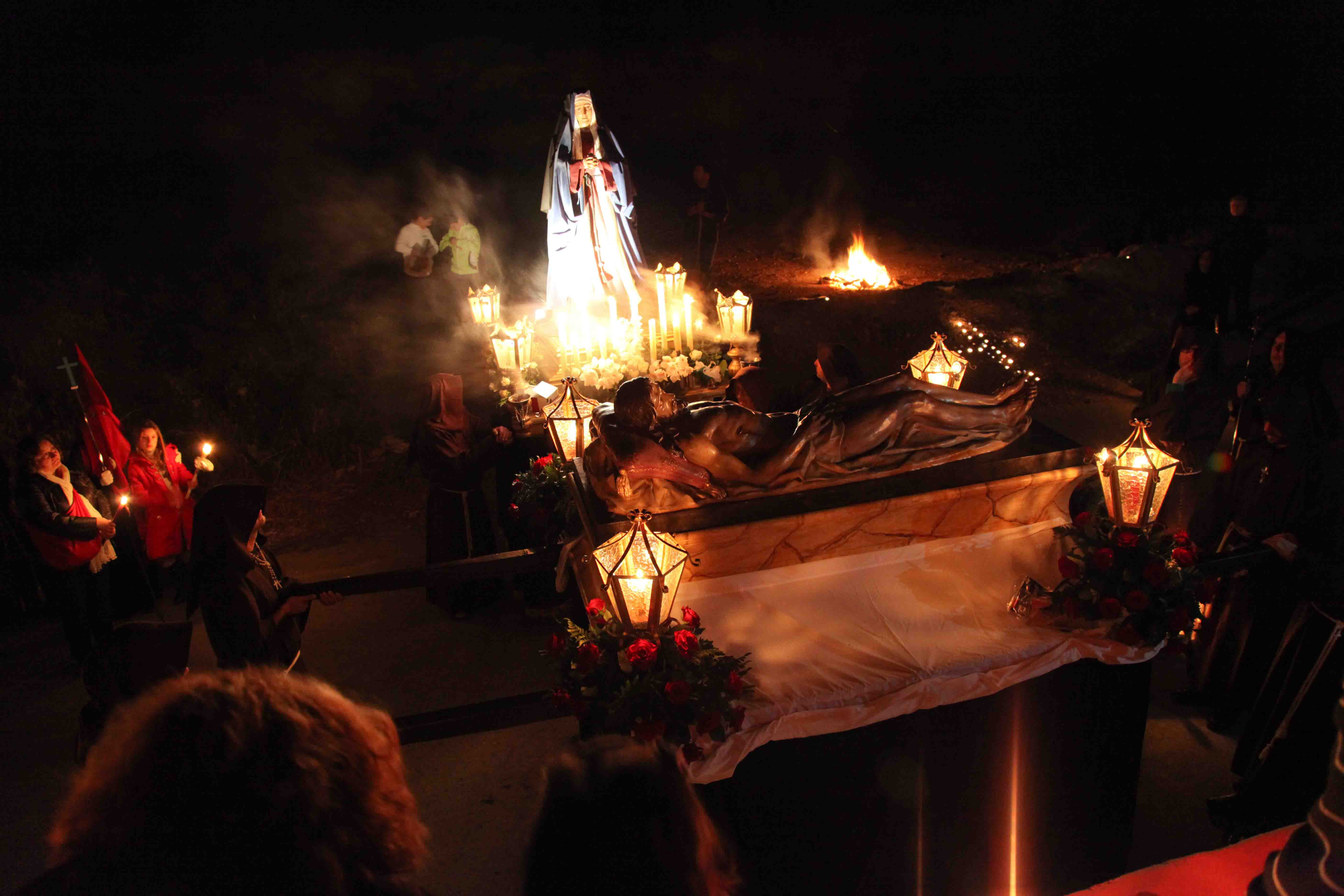 Encuentro en la procesión de la Hermanda del Cristo de la Salud en Algezares (Murcia)